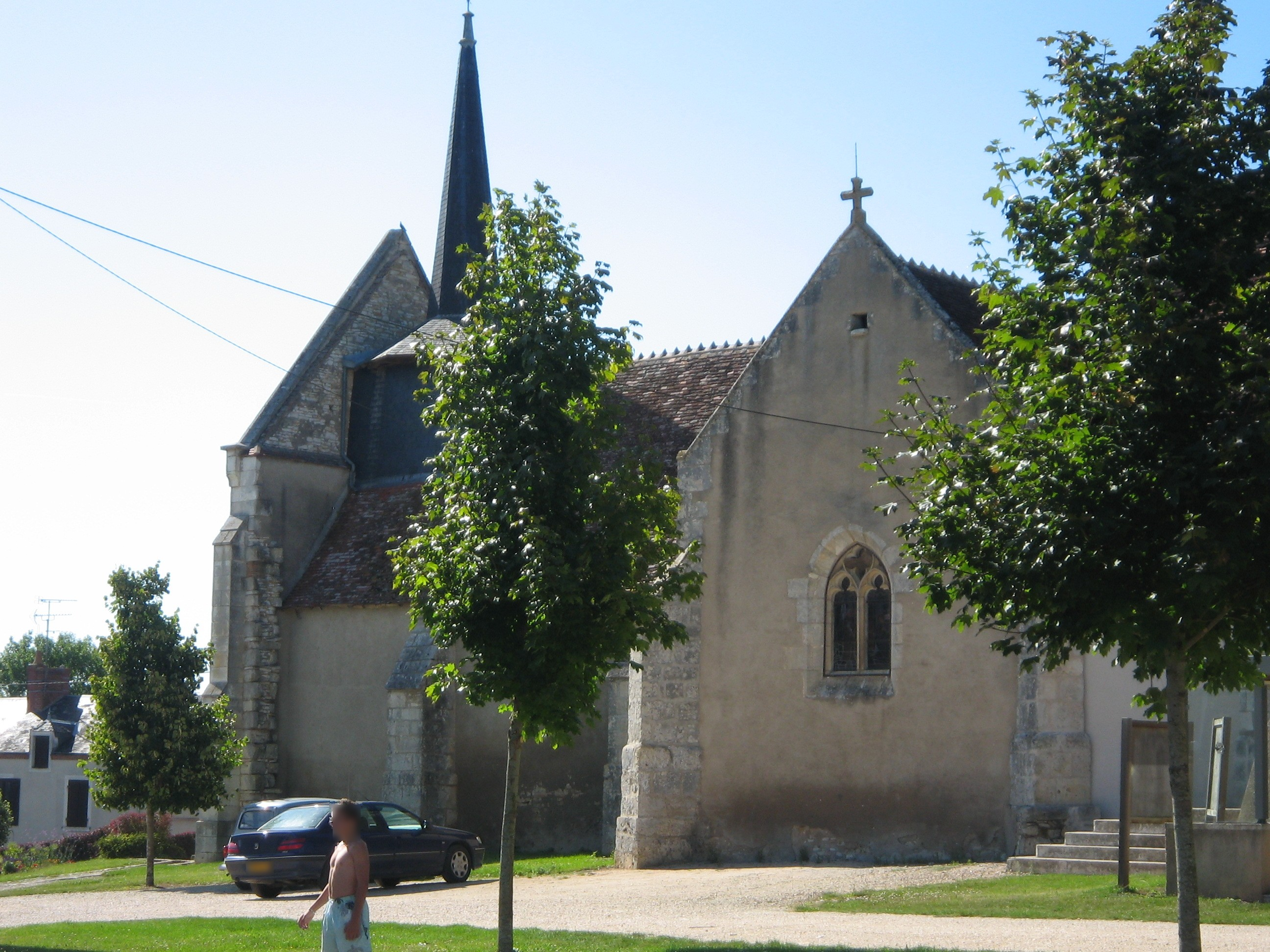 Eglise de saint Ambroix, XII°, XVI° et XIX°.